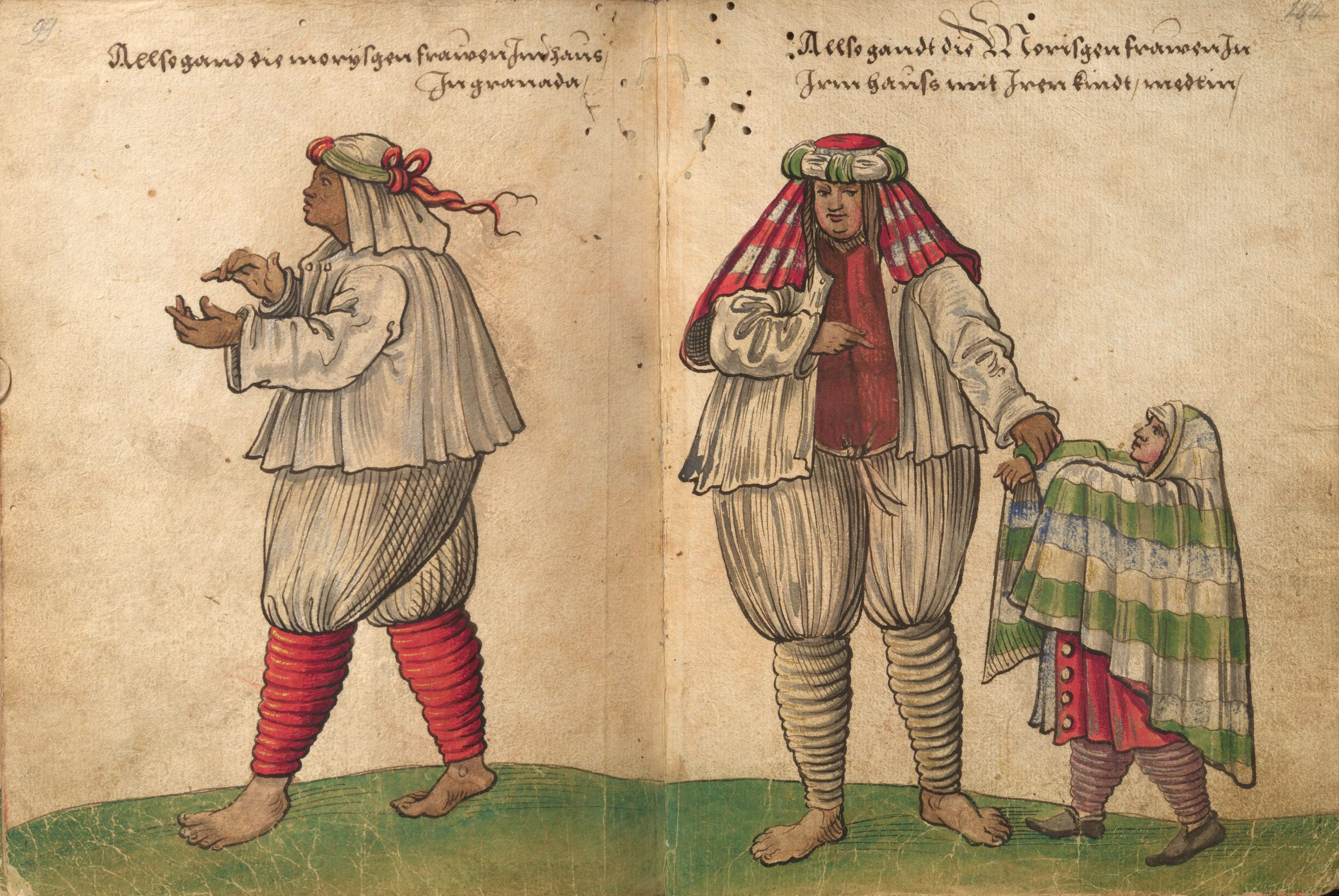 "Trachtenbuch" des Christoph Weiditz, Germanisches Nationalmuseum Nürnberg, Hs. 22474. Bl. 99-100 Haustracht der Morisken-Frauen und -Kinder.